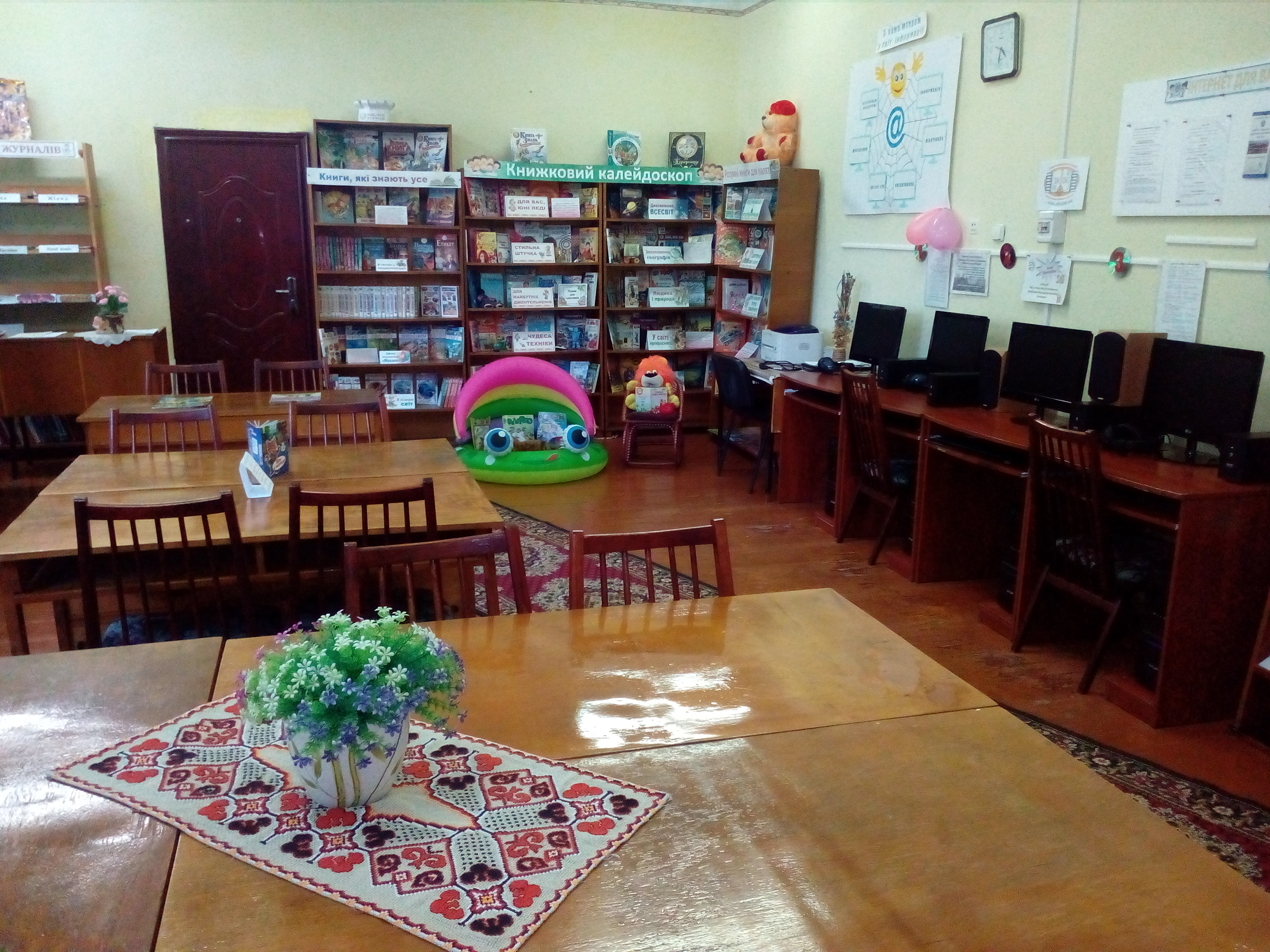 Читальний зал для користувачів різної вікової категорії. Бібліотека-філія №14. Хмельницька міська ЦБС.